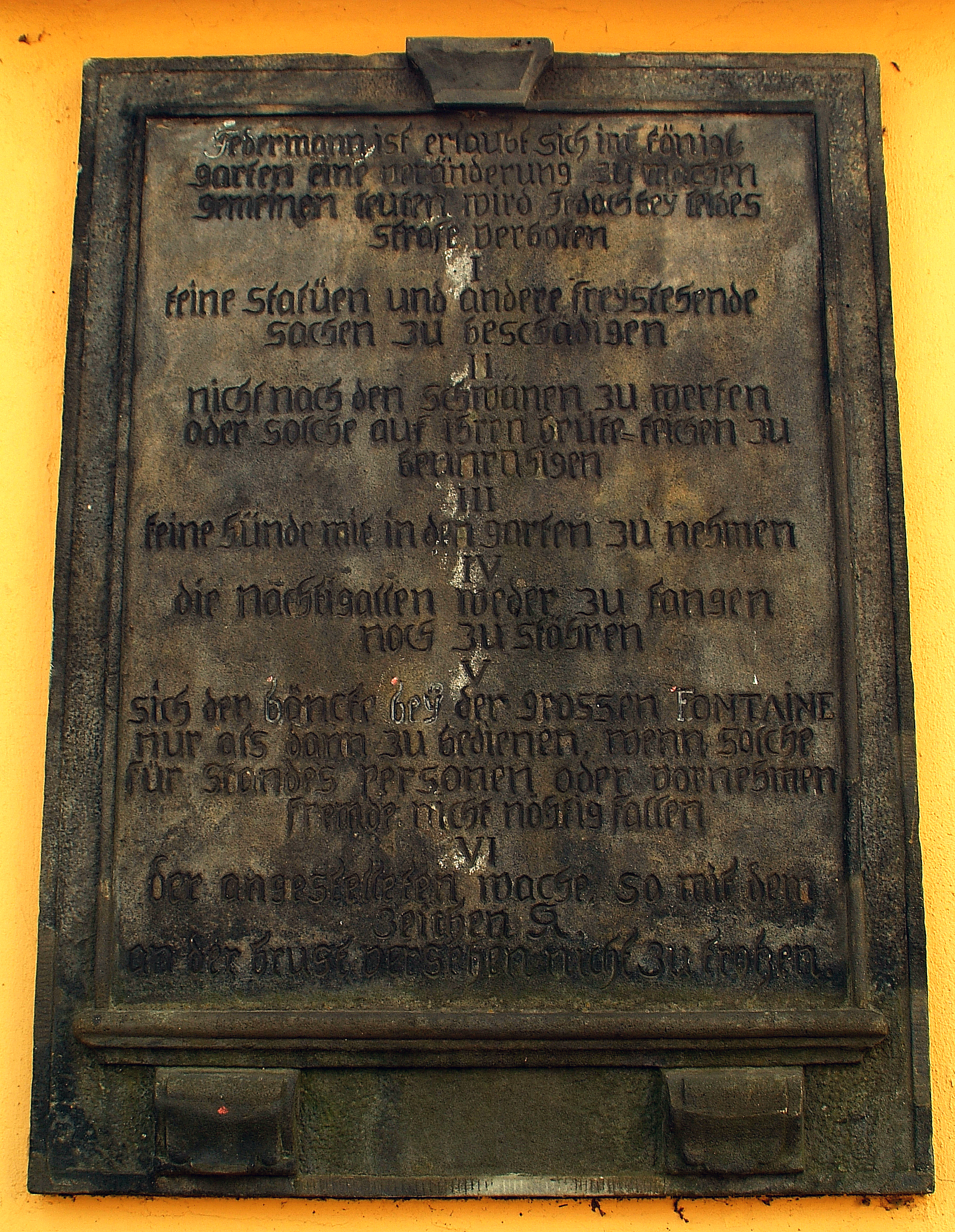 Abschrift: „Jedermann ist erlaubt, sich im königl. garten eine Veränderung zu machen gemeinen leuten wird Jedoch bey Leibes Strafe verboten I keine Statüen und andere freystehende sachen zu beschädigen II nicht nach den Schwänen zu werfen oder solche auf ihren brütt-teichen zu beunruhigen III keine hünde mit in den Garten zu nehmen IV die Nachtigallen weder zu fangen noch zu stöhren V sich der bänke bey der grossen FONTAINE nur als dann zu bedienen, wenn solche für Standes Personen oder vornehmen Fremde nicht nötig fallen VI der angestelleten Wache, so mit dem Zeichen GR an der Brust versehen nicht zu trotzen.“